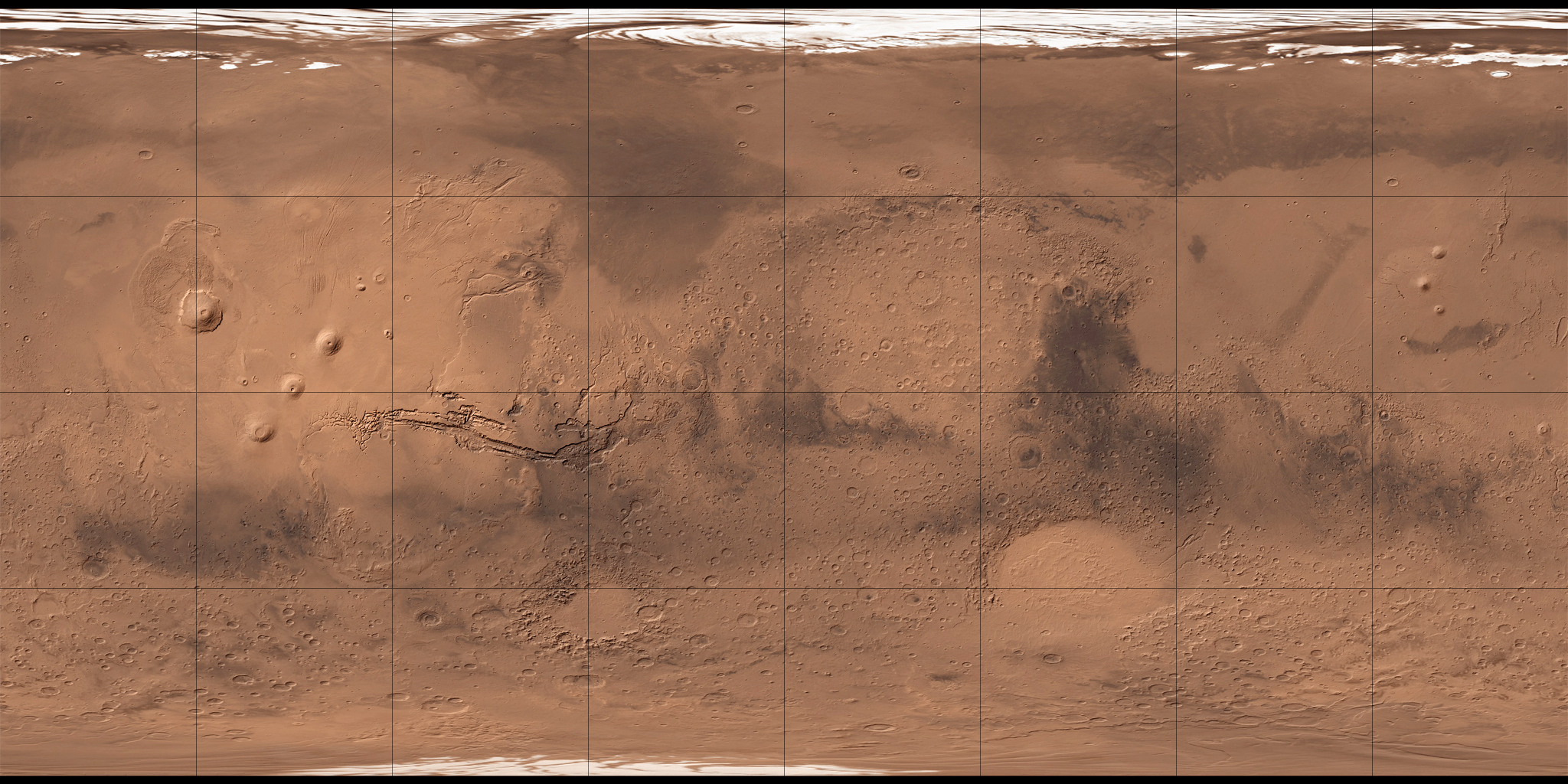 Carte de Mars reconstituée à partir des mesures de Mars Global Surveyor (MOLA) et des observations de Viking.